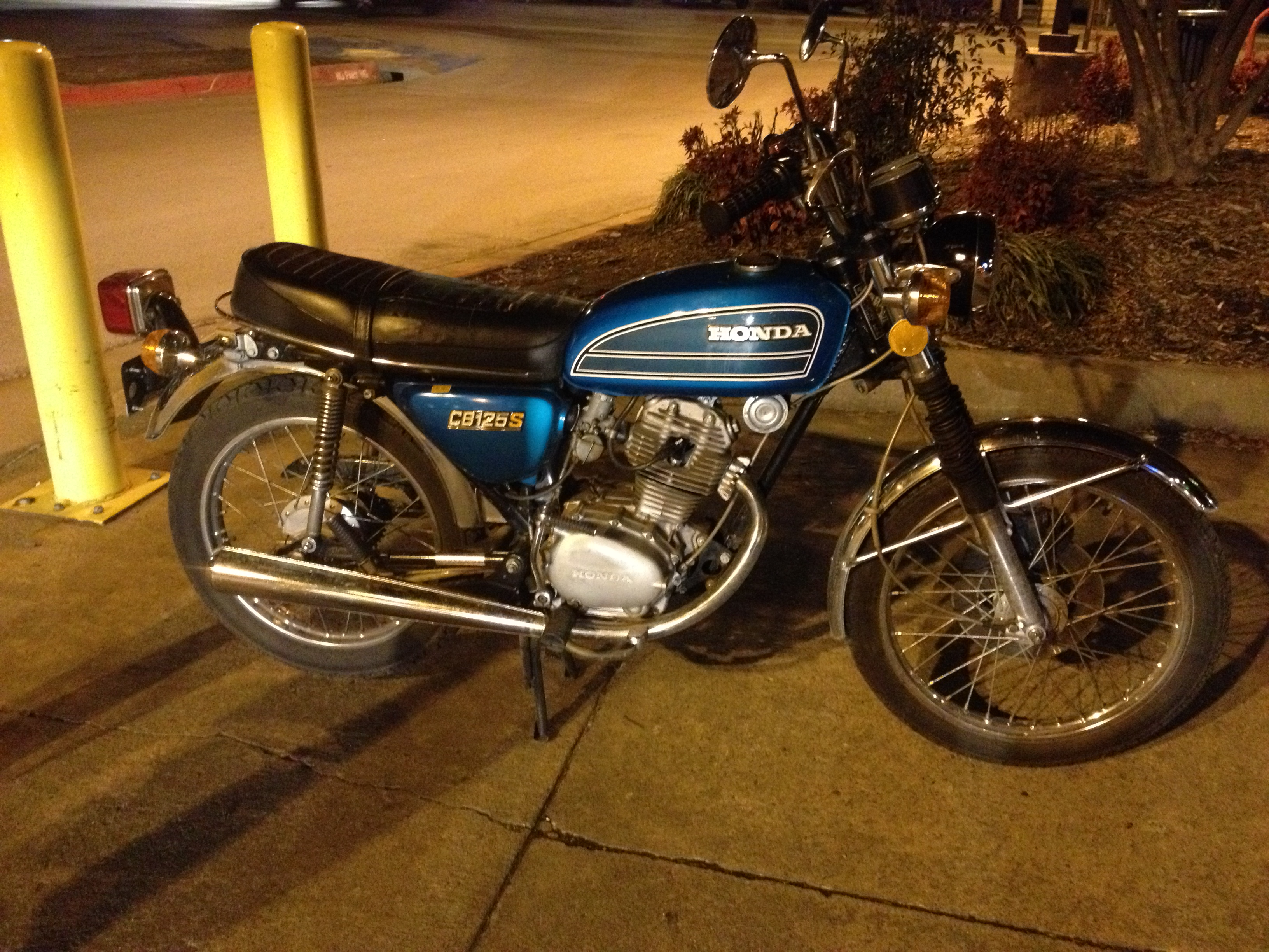 Seen in Fayetteville Arkansas USA.